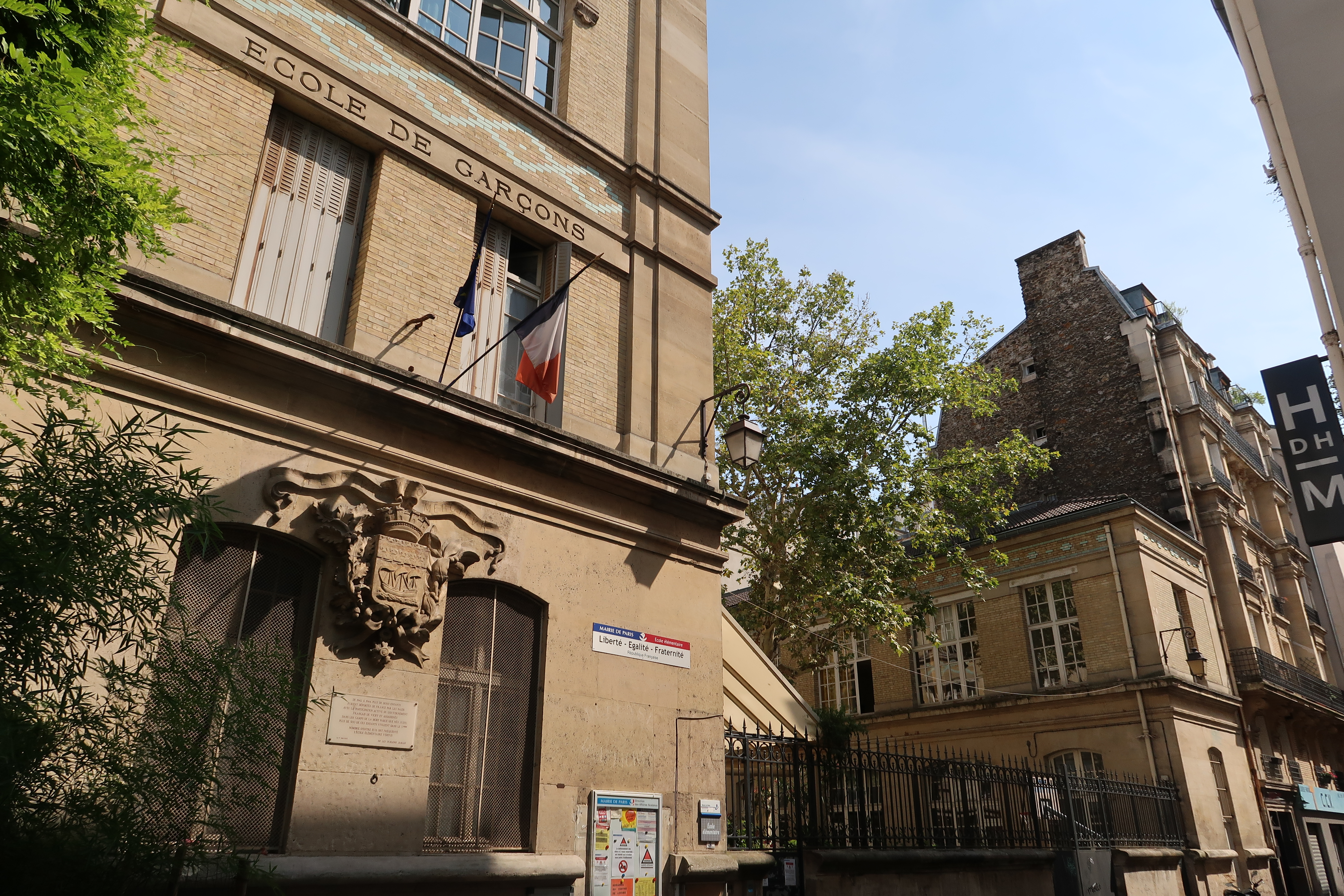 École élémentaire des Vertus, 8 rue des Vertus (Paris, 3e).